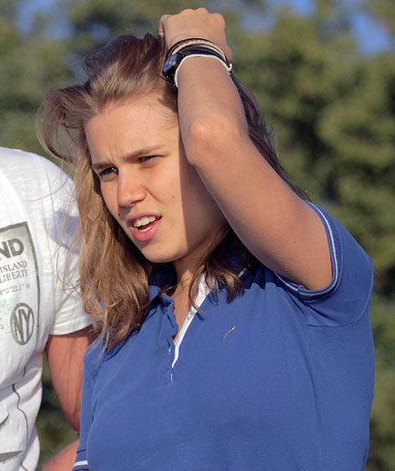 Актриса Даша Мельникова на съемках клипа "Любовь над облаками".